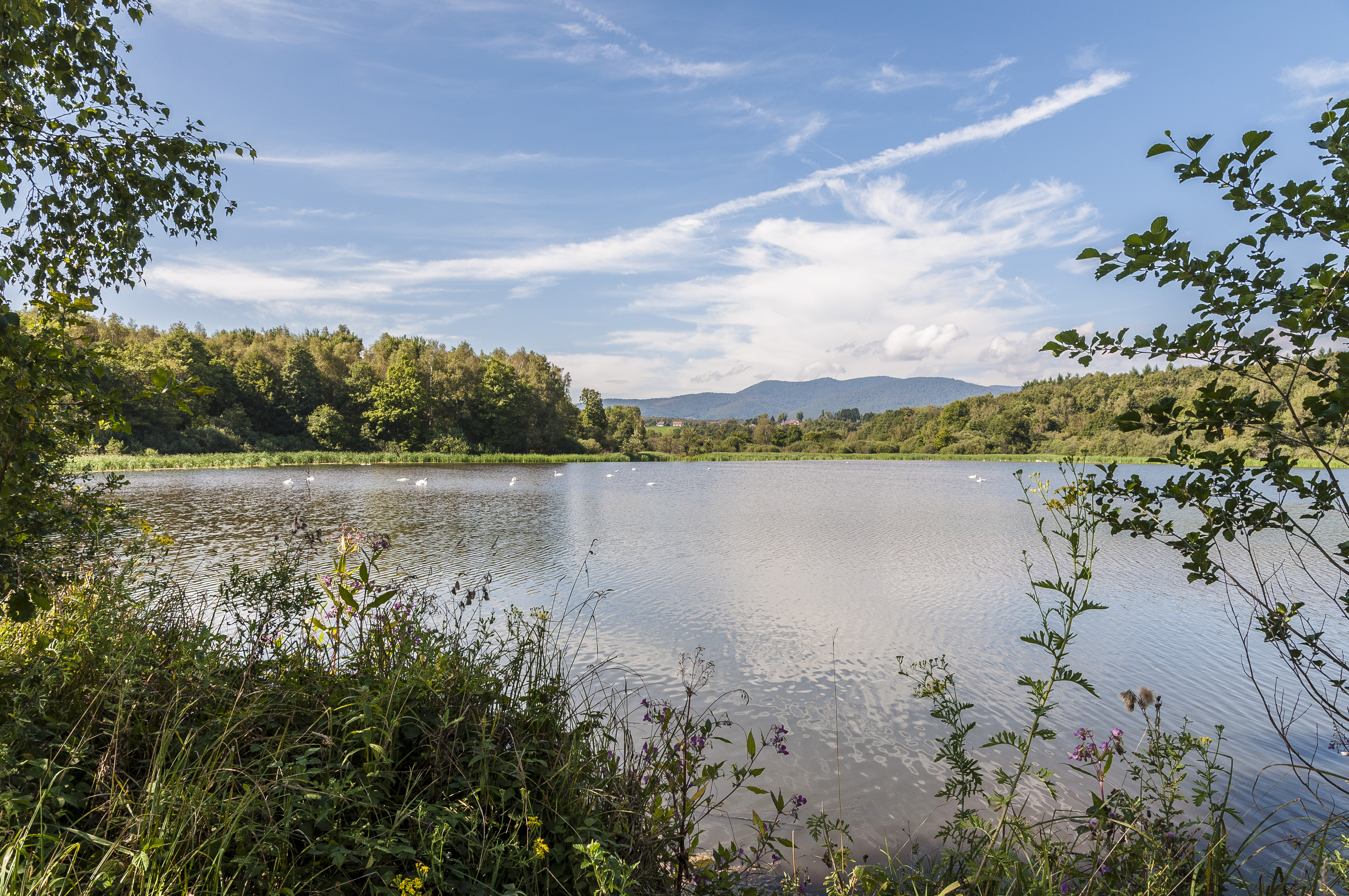 L'étang de la Véronne est un vaste plan d'eau exclusivement dédié à la pêche.